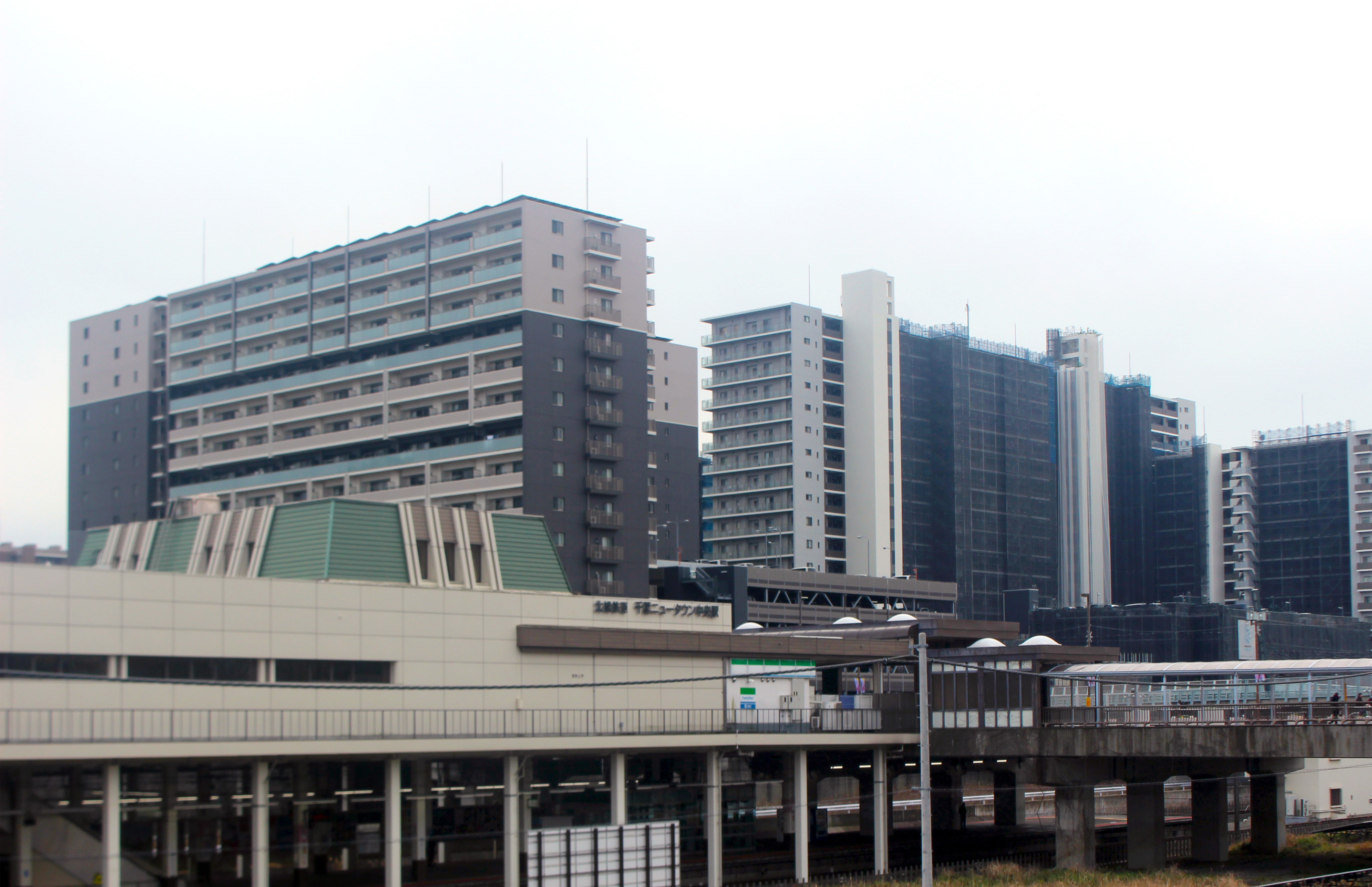 千葉ニュータウン中央駅 北口